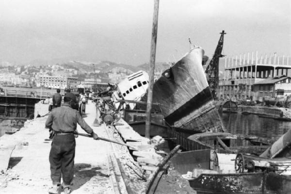 Italia Dopoguerra - Genova - La ricostruzione del porto - operai al lavoro sul molo dove si trova il relitto di una nave